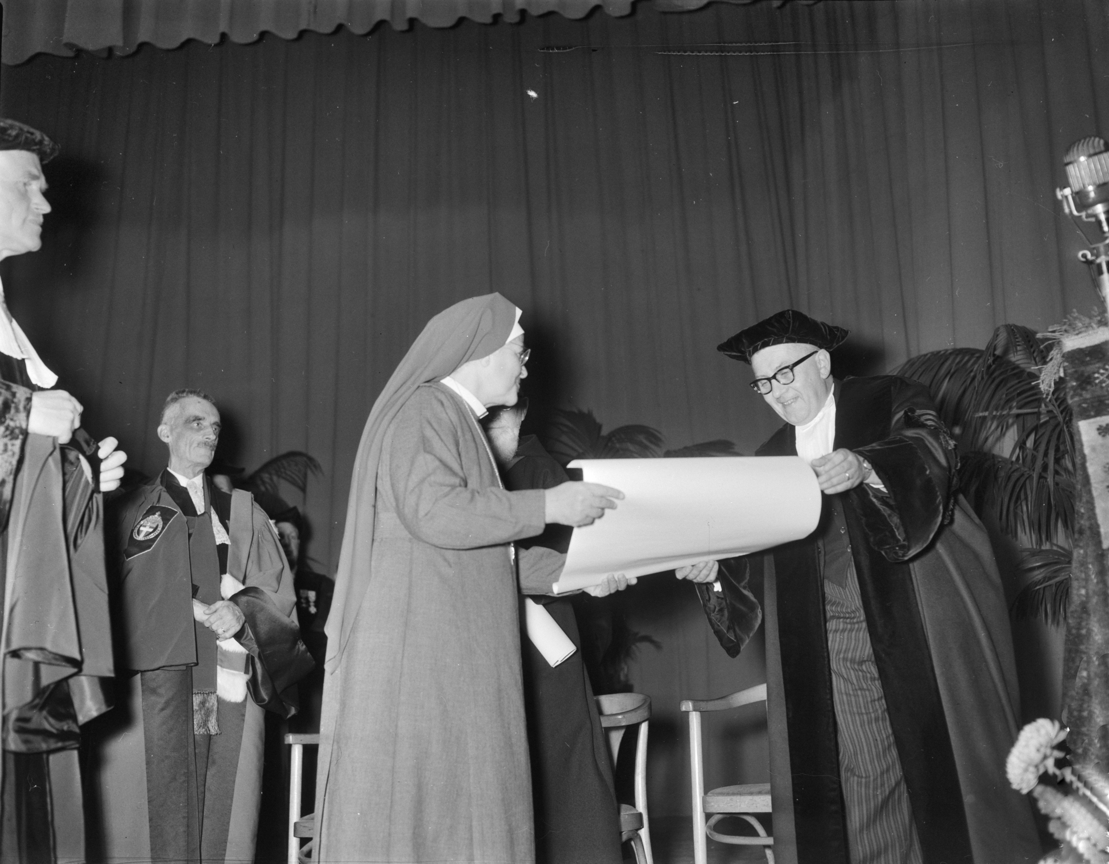 Van links naar rechts: prof. J.H. Terlingen, René Savatier, Anna Dengel (stichteres van de medische missiezusters) en prof. dr. A. Mertens. Uitreiking drie eredoctoraten t.g.v. het 7de lustrum van de Katholieke Universiteit te Nijmegen.10 november 1958